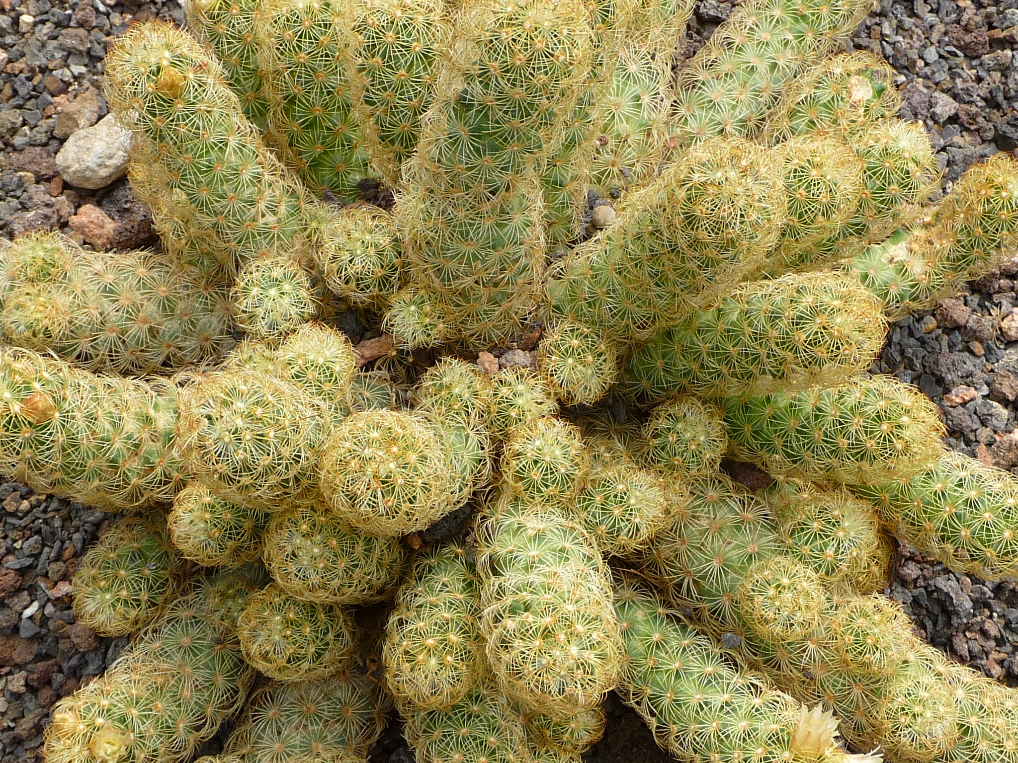 Warzenkaktus (Mammillaria elongata)